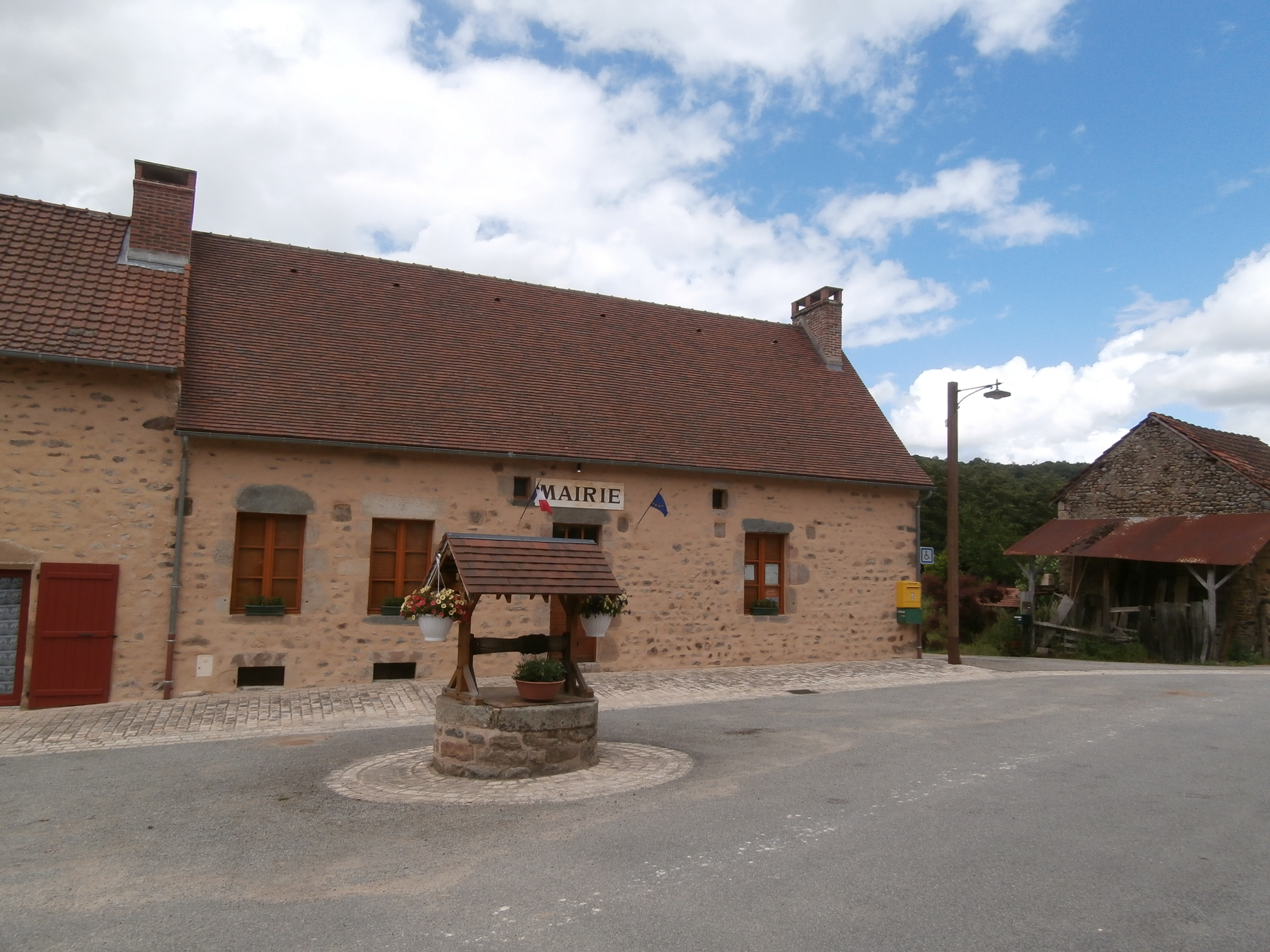 Mairie